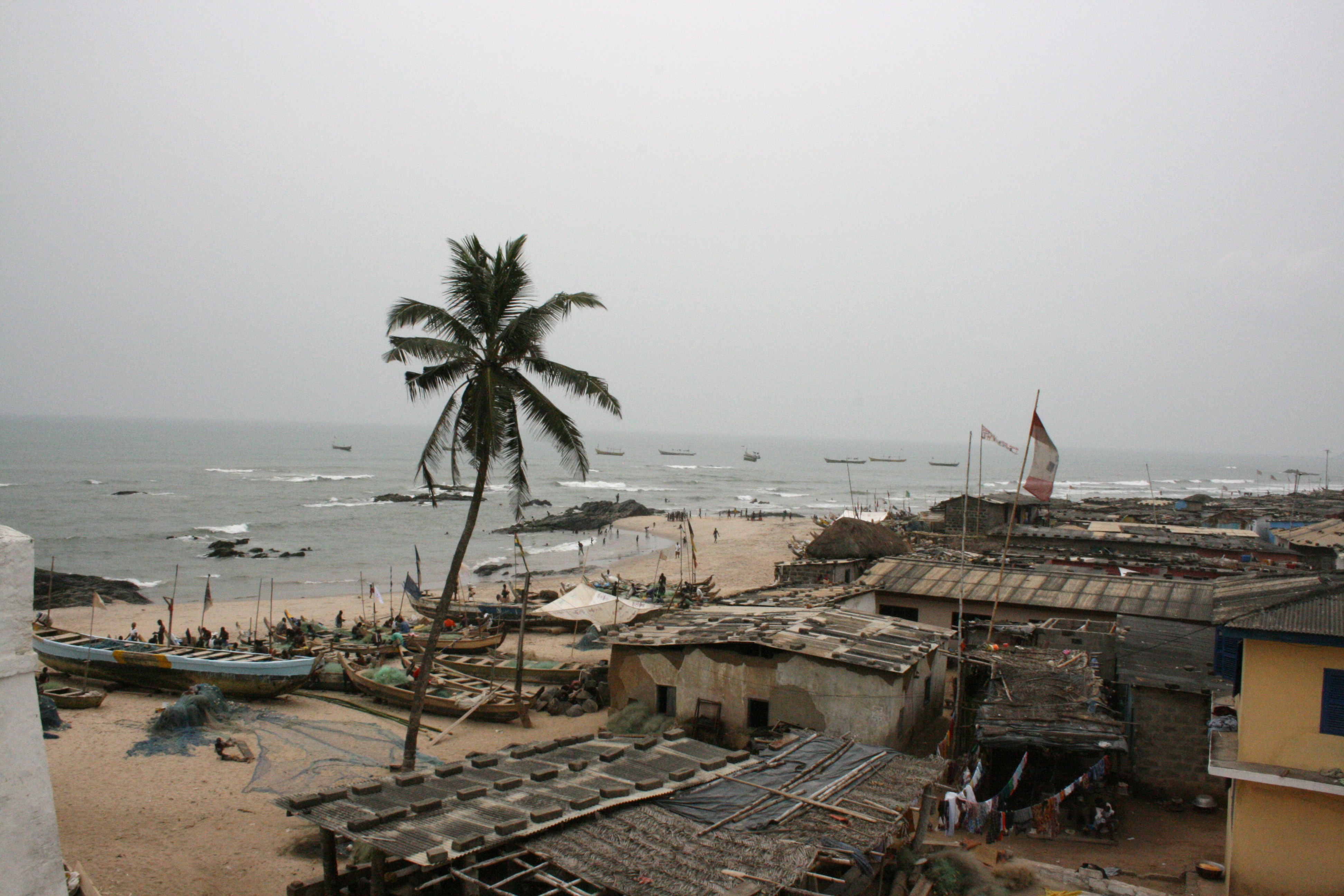 Anomabu outlook